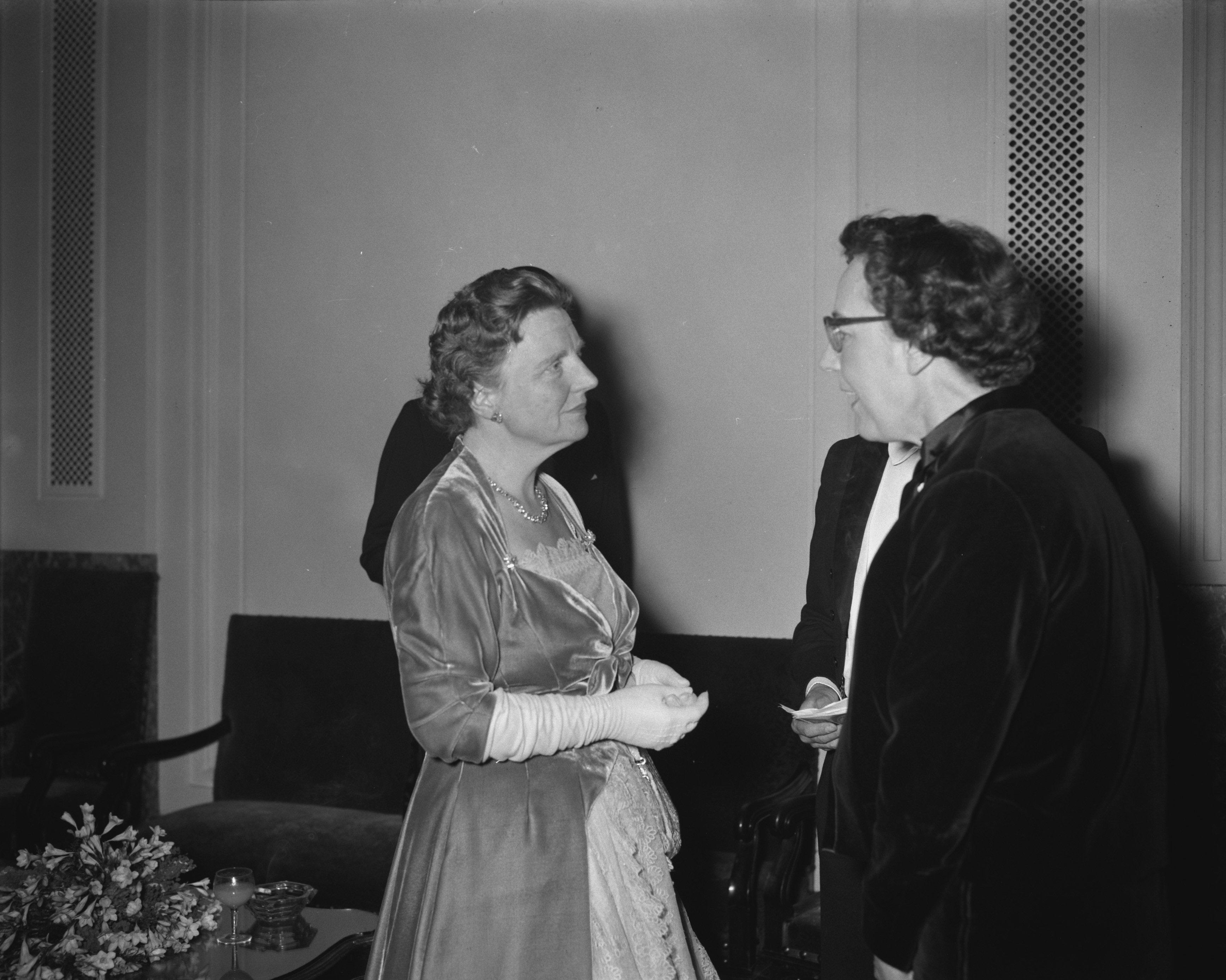 Koningin Juliana in gesprek met de schrijfster Anna Blaman tijdens het Boekenbal 1958 (Stadsschouwburg Amterdam NL, 28 februari 1958)